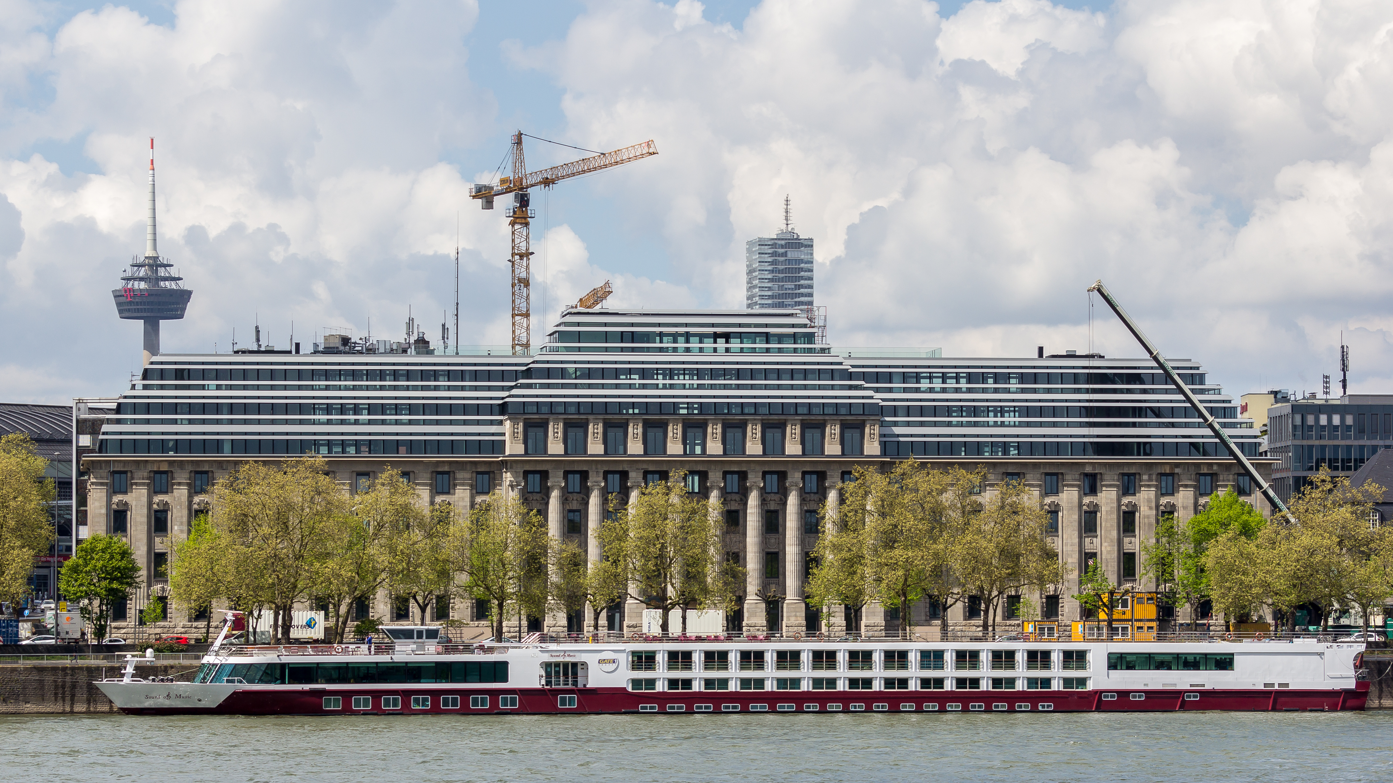 "Neue Direktion Köln", die alte Reichsbahndirektion Köln, nach dem erfolgtem Umbau, nun mit 3 zusätzlichen Staffelgeschossen. Am Ufer liegt das Flusskreuzfahrtschiff Sound of Music (ENI 02327687) This is a photograph of an architectural monument.